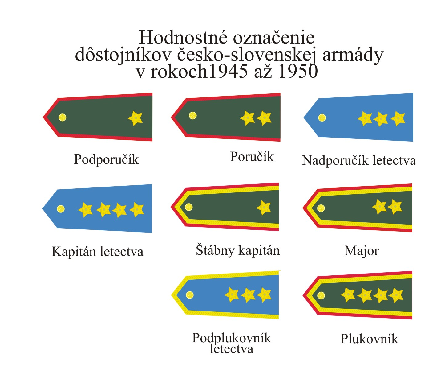 Hodnostné označenie dôstojníkov Česko-Slovenskej armády v rokoch 1945-1950